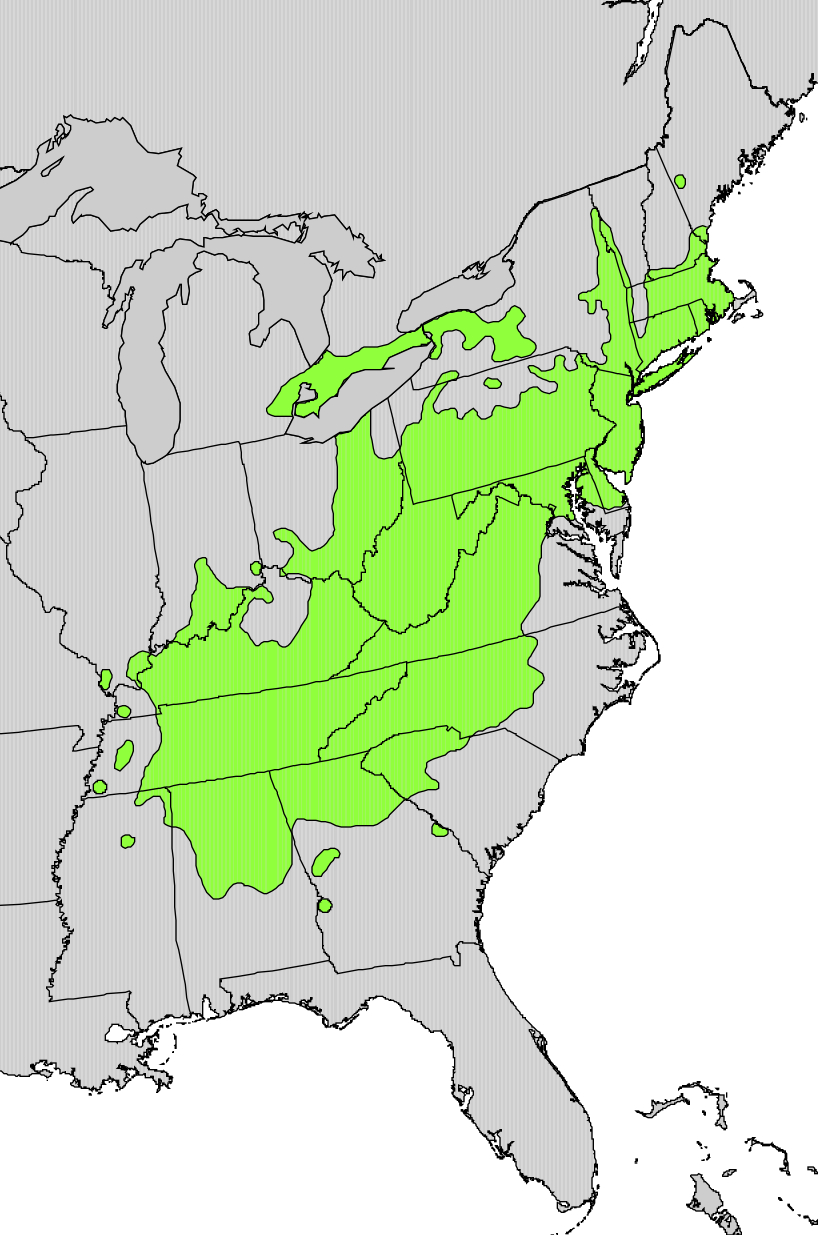 Mapa de distribució del Quercus prinus